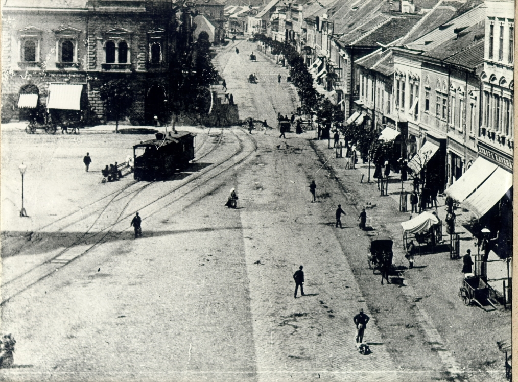 Piata Unirii din Cluj-Napoca 1902.